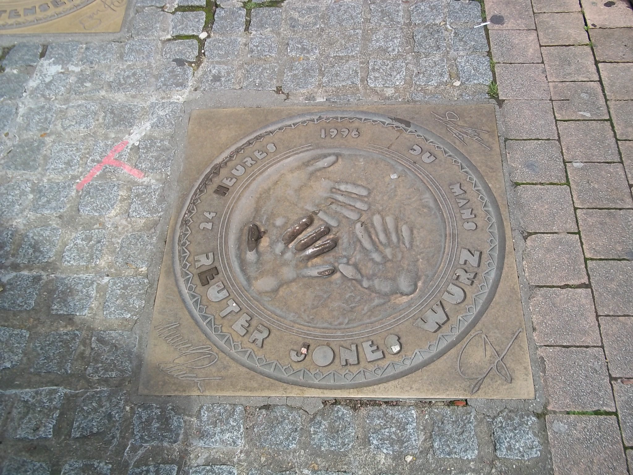 Plaque de bronze des empreintes des vainqueurs des 24 heures 1996